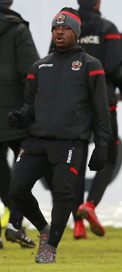 Подопечные Семина и Фавра готовятся к бою